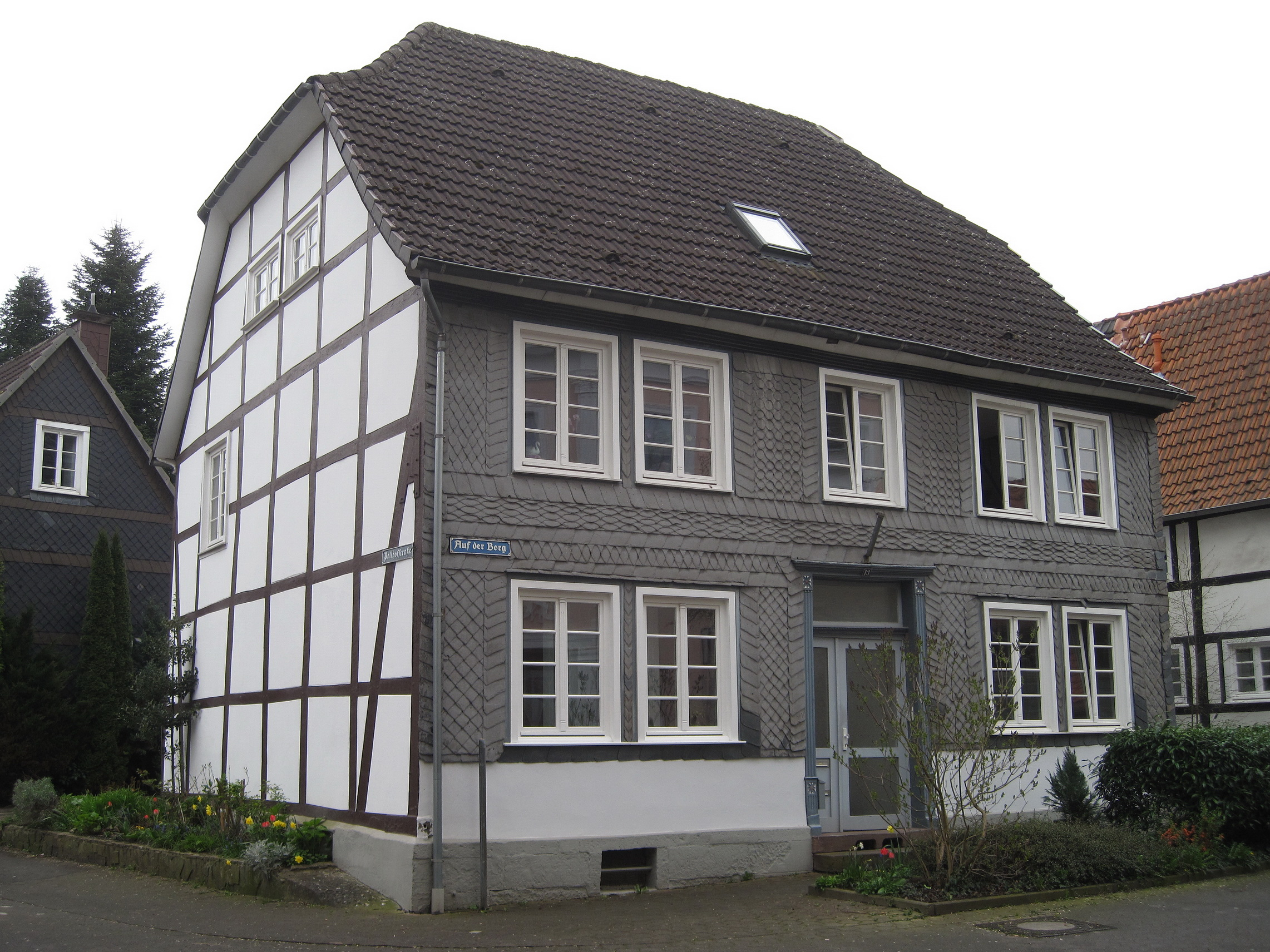 Stolpersteine vor dem Haus Auf der Borg 13 in Soest. This image shows a heritage building in Germany, located in the North Rhine-Westphalian city Soest (no. 53).